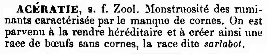 Article d'un dictionnaire paru en 1865 qui parle de la race Sarlabot.